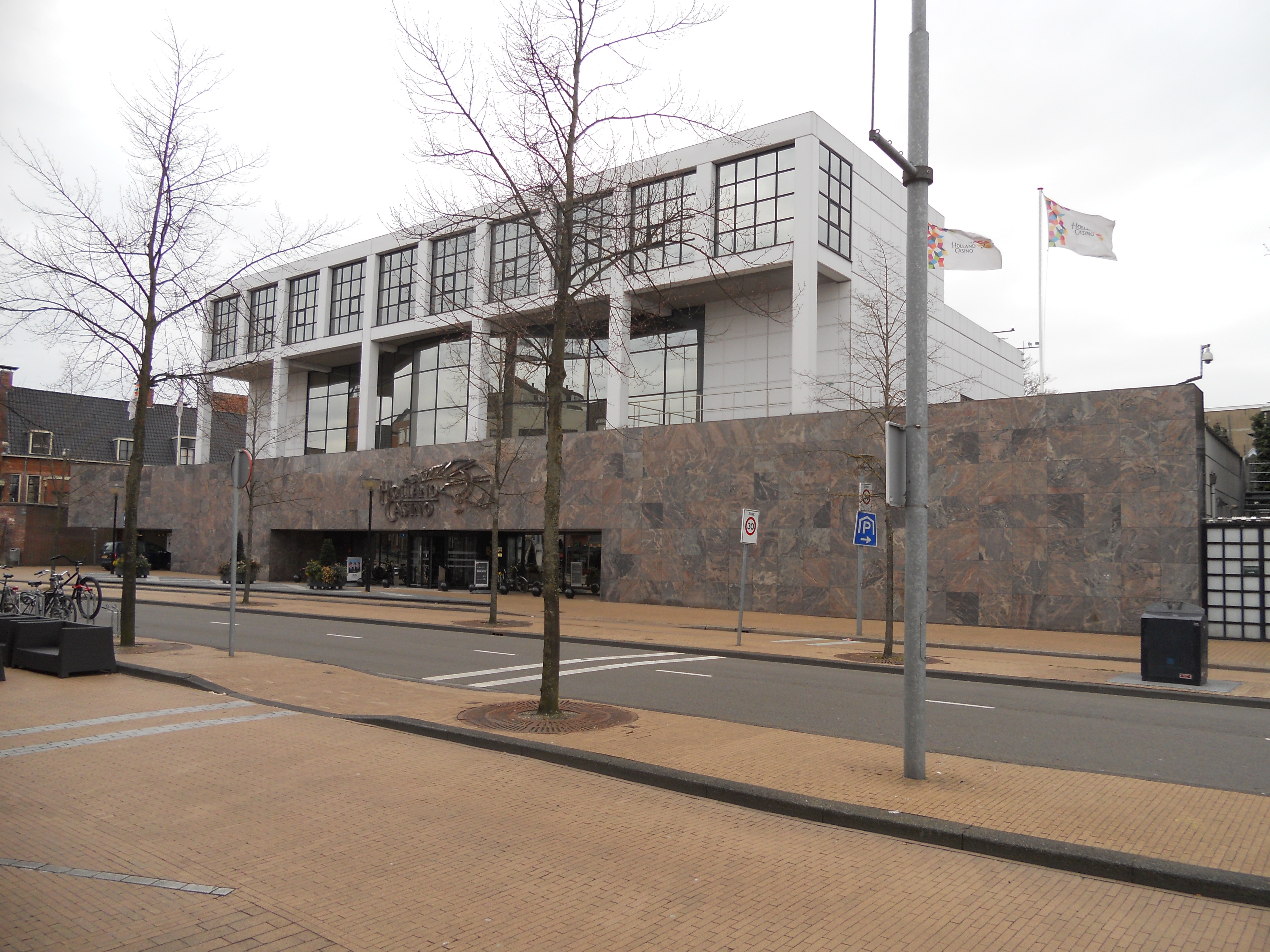 Holland Casino in Groningen aan de Gedempte Kattendiep